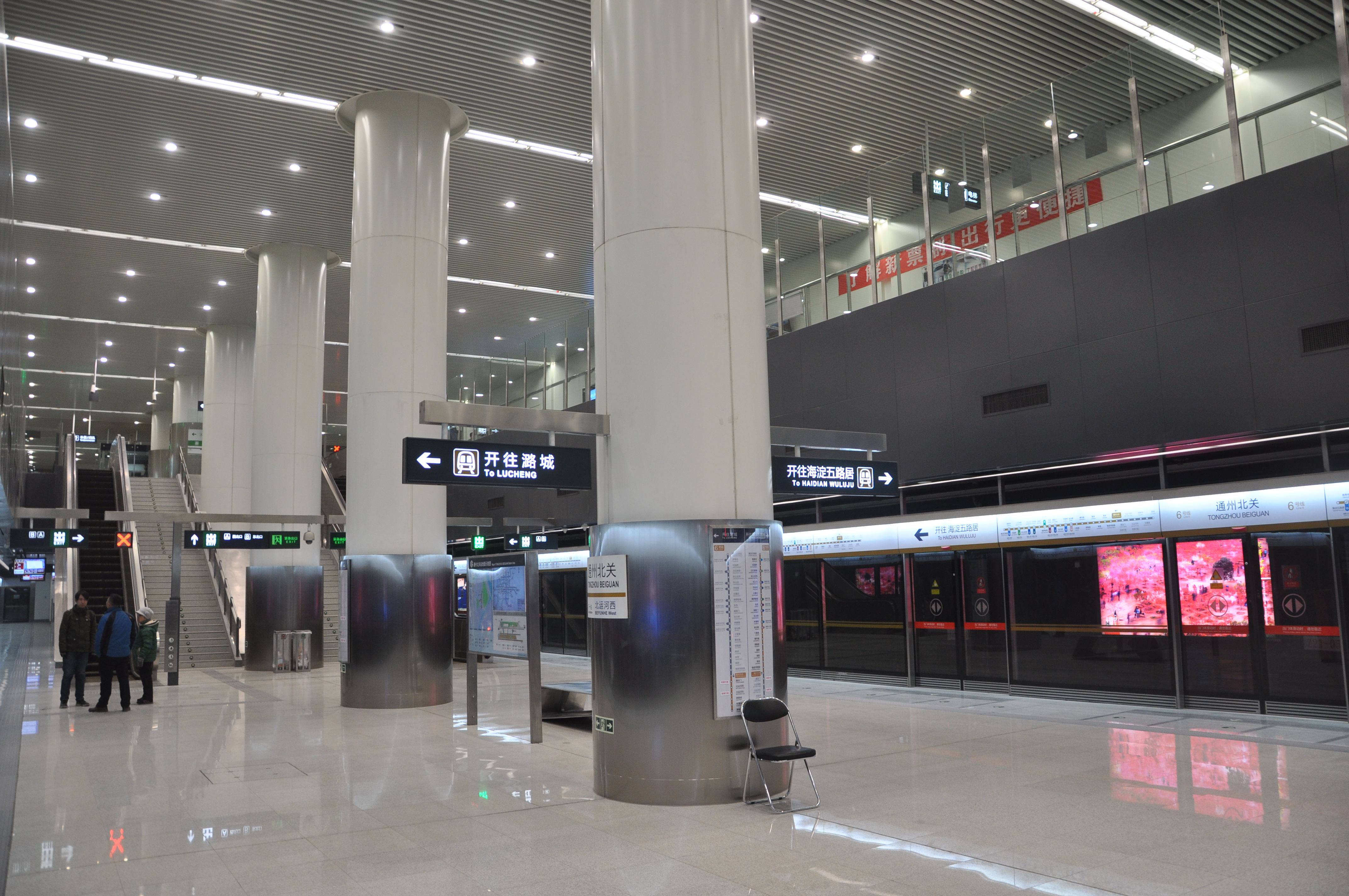 北京地铁6号线通州北关站站台，上方没有站厅层楼板，可见车站顶棚。